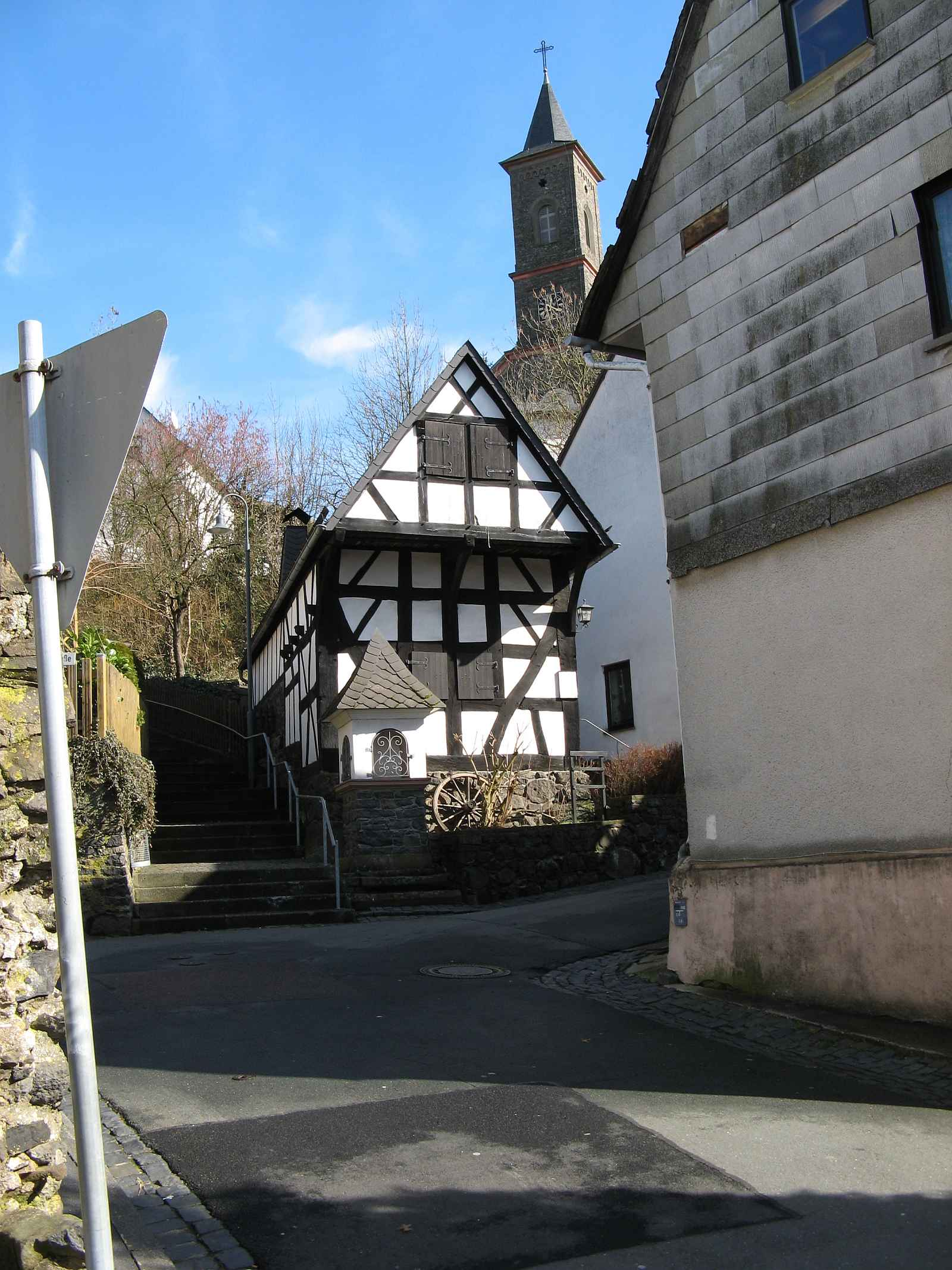 Alte Schmiede Waldbrunn Ellar, Hessen, Deutschland